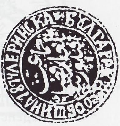 Леринска Българска Община - 1874